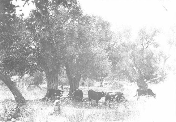 "עצי הארבעים" - מקום קדוש לערבים - רועה ומרעה בחיפה